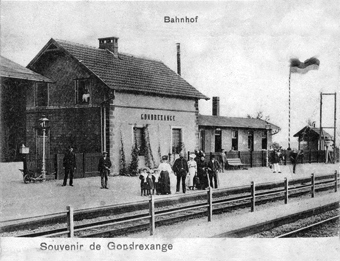 La gare de Gondrexange vers 1900. Elle est située en territoire annexé par l'allemagne.